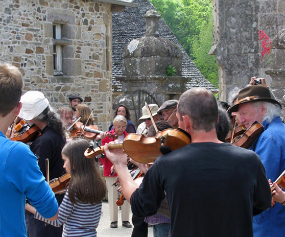 Fête du violon à Saint-Jean-du-Doigt, Finistère, Bretagne, France. Rendez-vous annuel des violonistes amateurs et professionnels de la région.